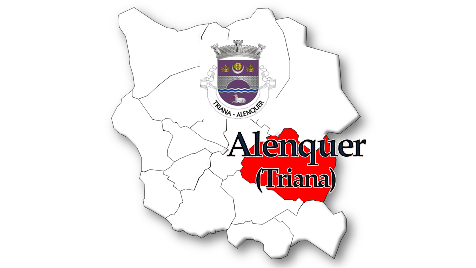 Evolução da População